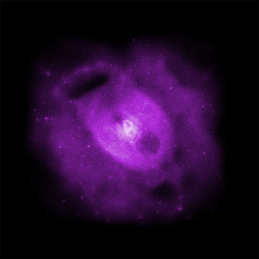 NGC 5813 -X rays